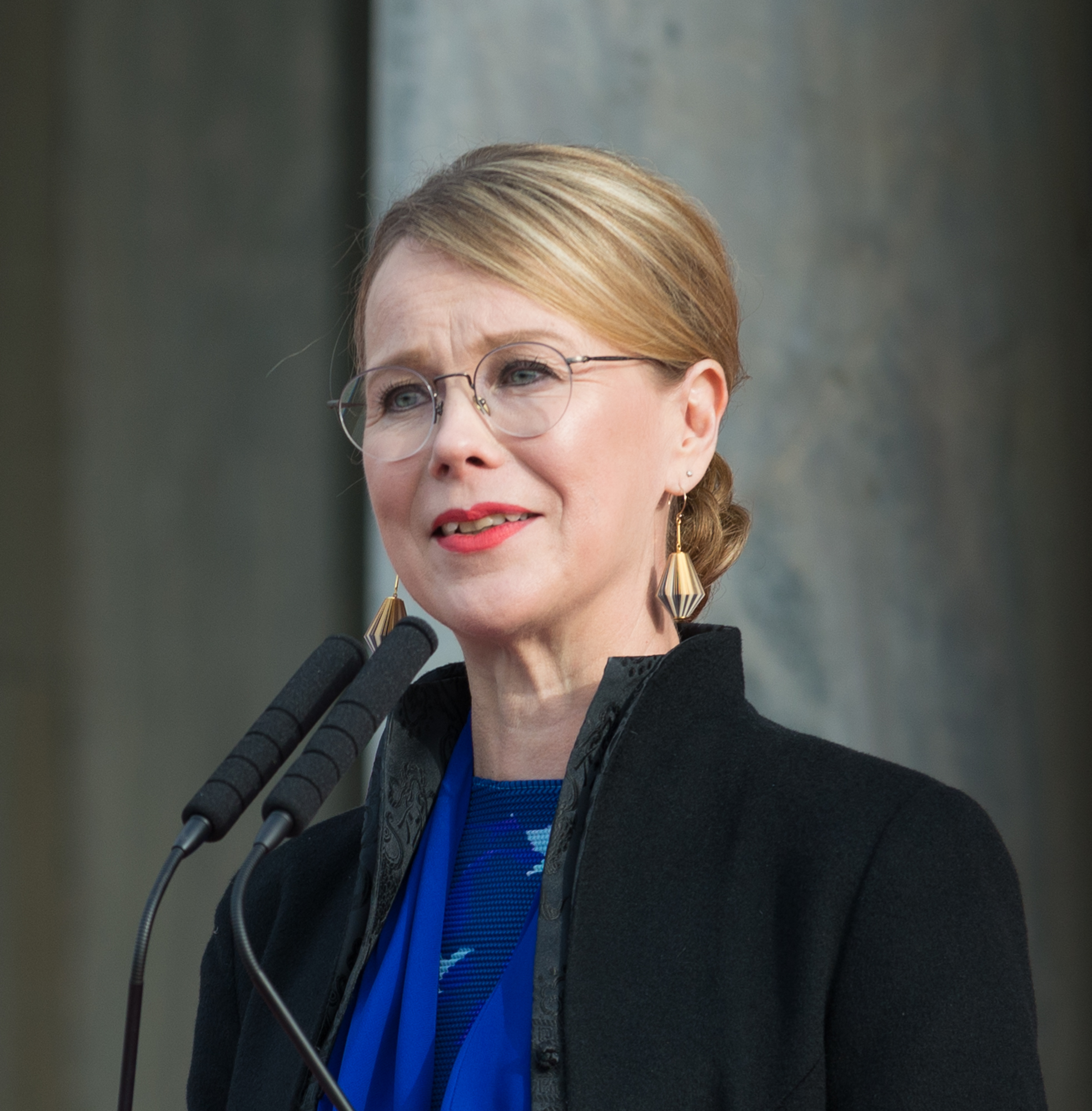 Susanna Pettersson nyinviger Nationalmuseum i Stockholm 2018 i närvaro av HM Konungen, HM Drottningen, HKH Kronprinsessan och HKH Prins Daniel och kulturminister Alice Bah Kuhnke.